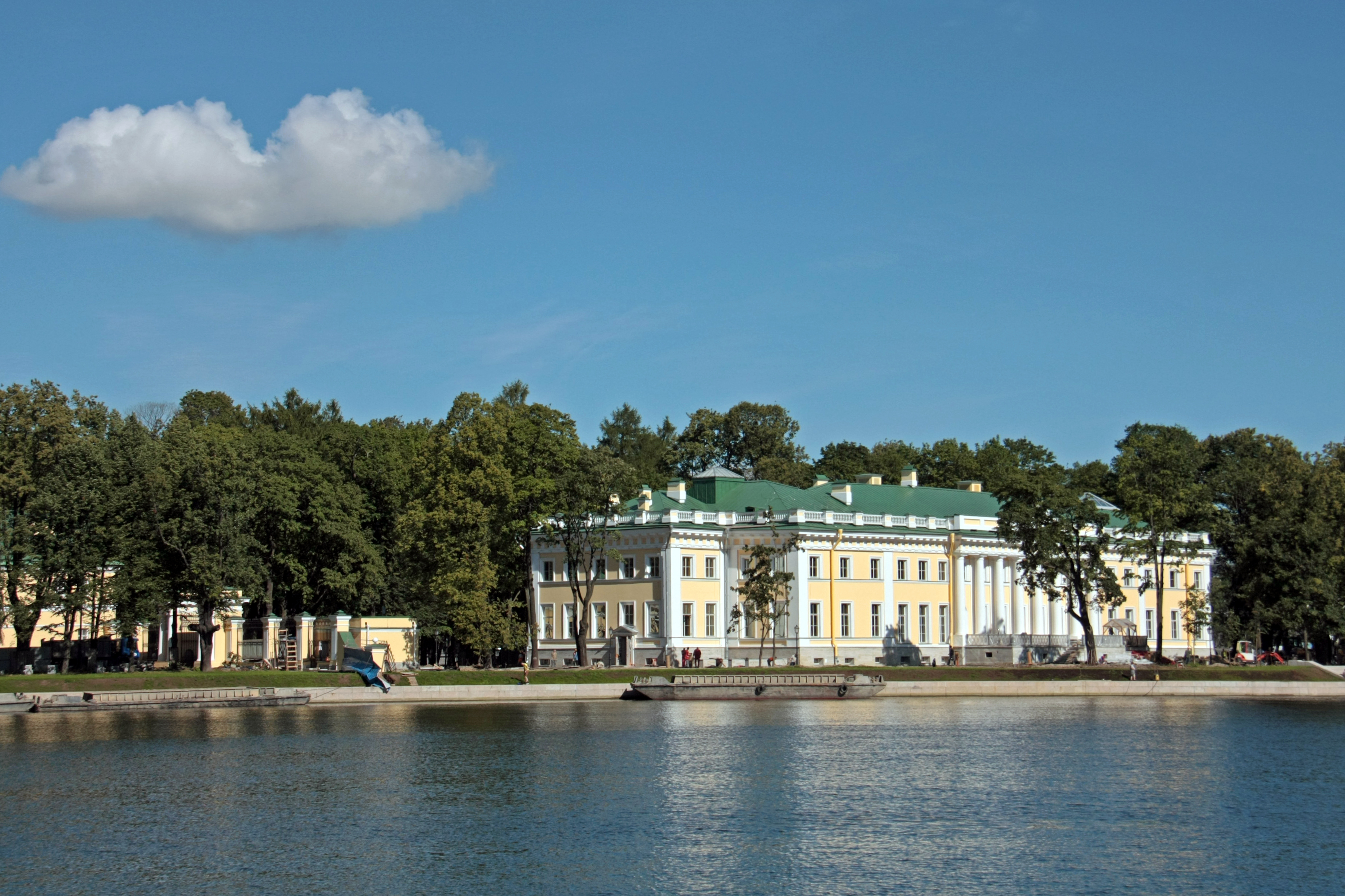 Каменноостровский дворец: Каменный остров: набережная р. Малой Невки, 1, набережная р. Большой Невки, Каменноостровский проспект, 77, 83, Петроградский район, Санкт-Петербург